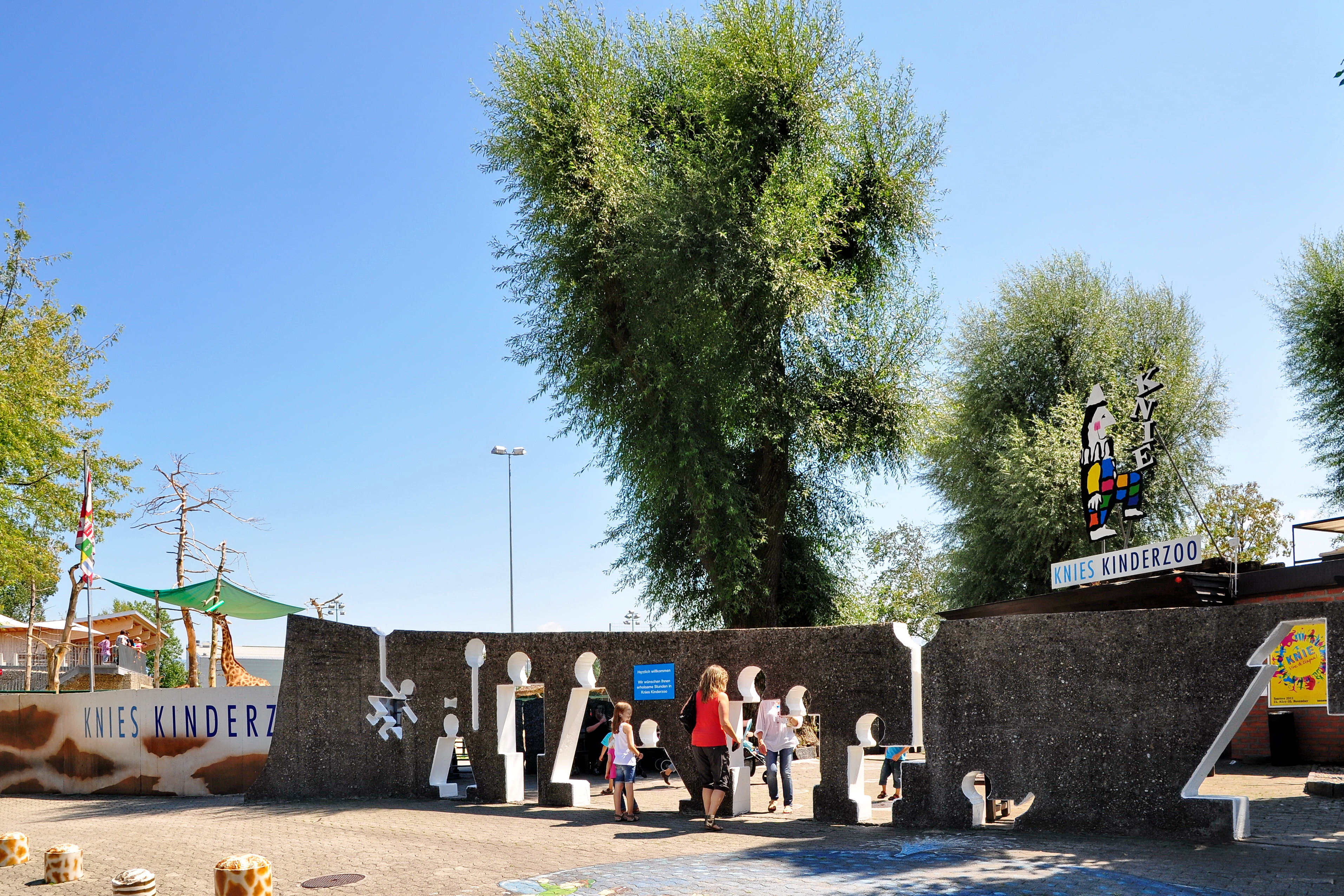 Knie's Kinderzoo in Rapperswil (Switzerland)